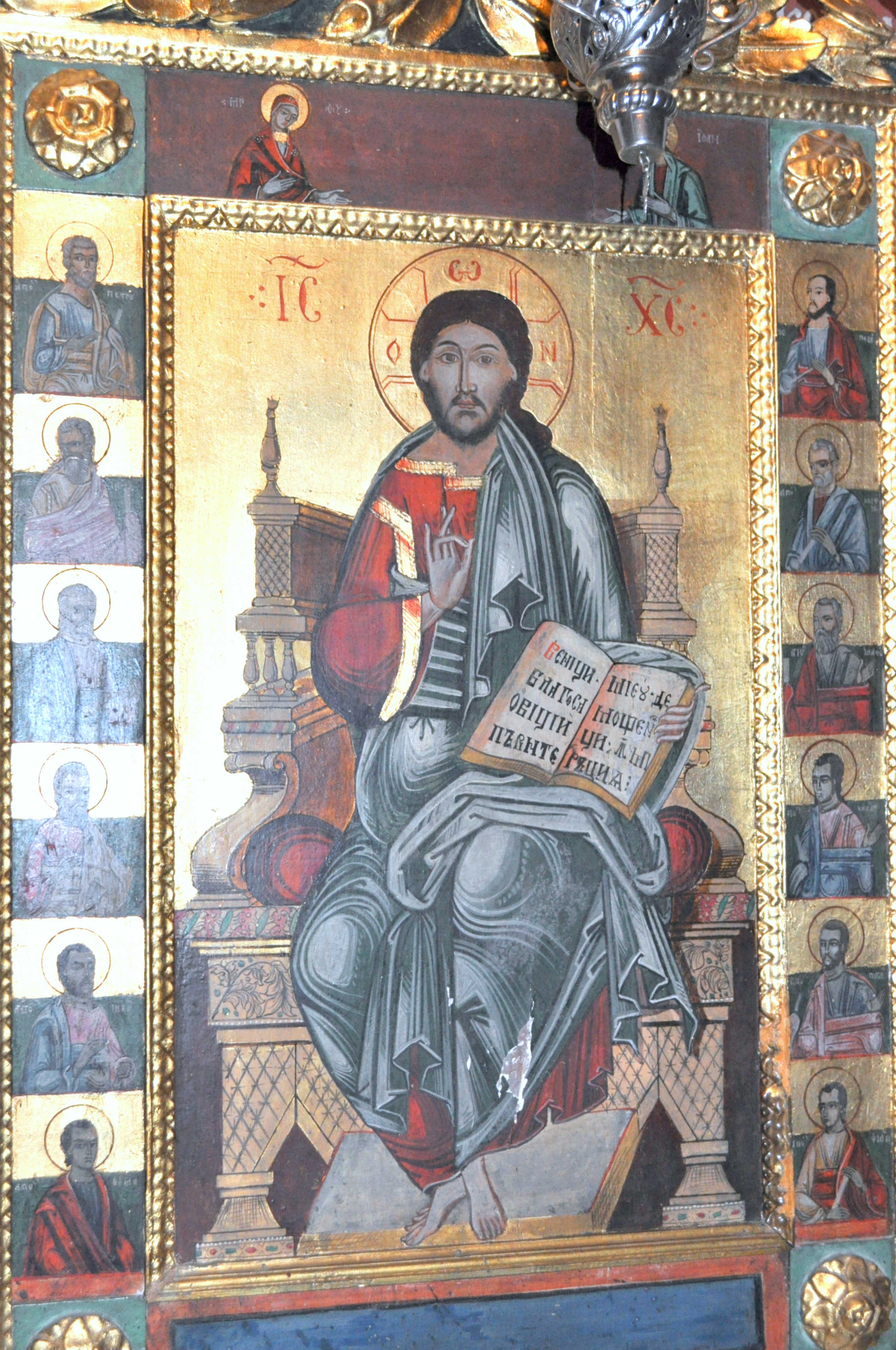 Biserica "Sf. Nicolae" din Mohu, județul Sibiu